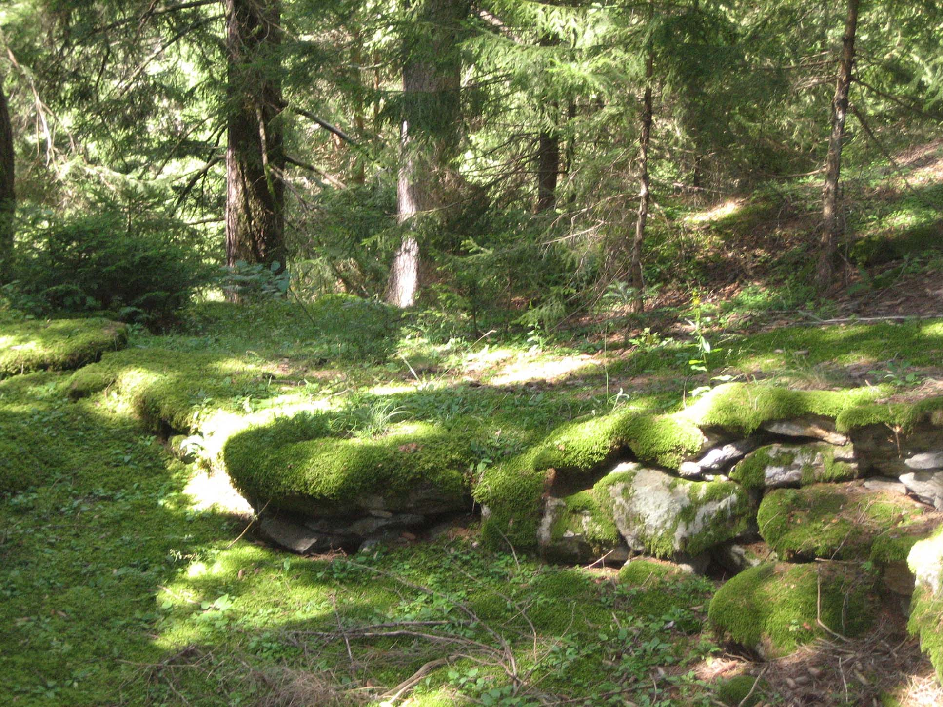 Zugang